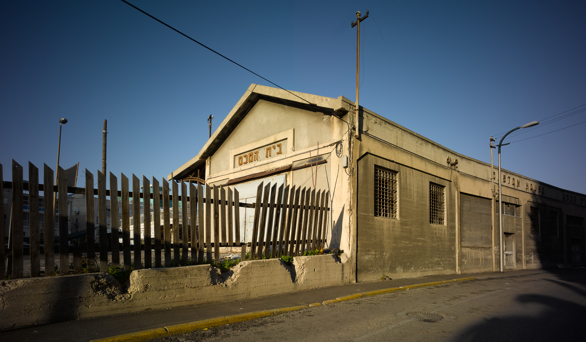 מבנה מנדטורי נטוש, השוכן בין שני מסלוליו של רחוב הרכבת בתל אביב. המבנה שימש כבית המכס של תחנת הרכבת "תל אביב", שפעלה לצד מסילת הרכבת לירושלים בין השנים 1920-1970.